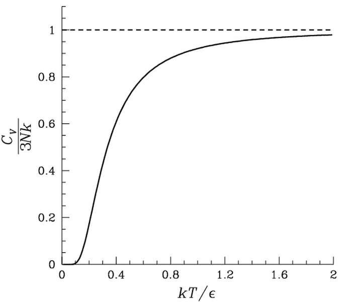 Cv=f(T) in Einstein solid